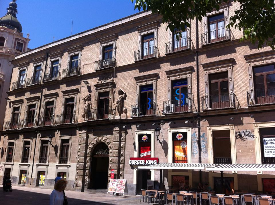 Fachada del Palacio Almodovar de la ciudad de Murcia (Region de Murcia, España).